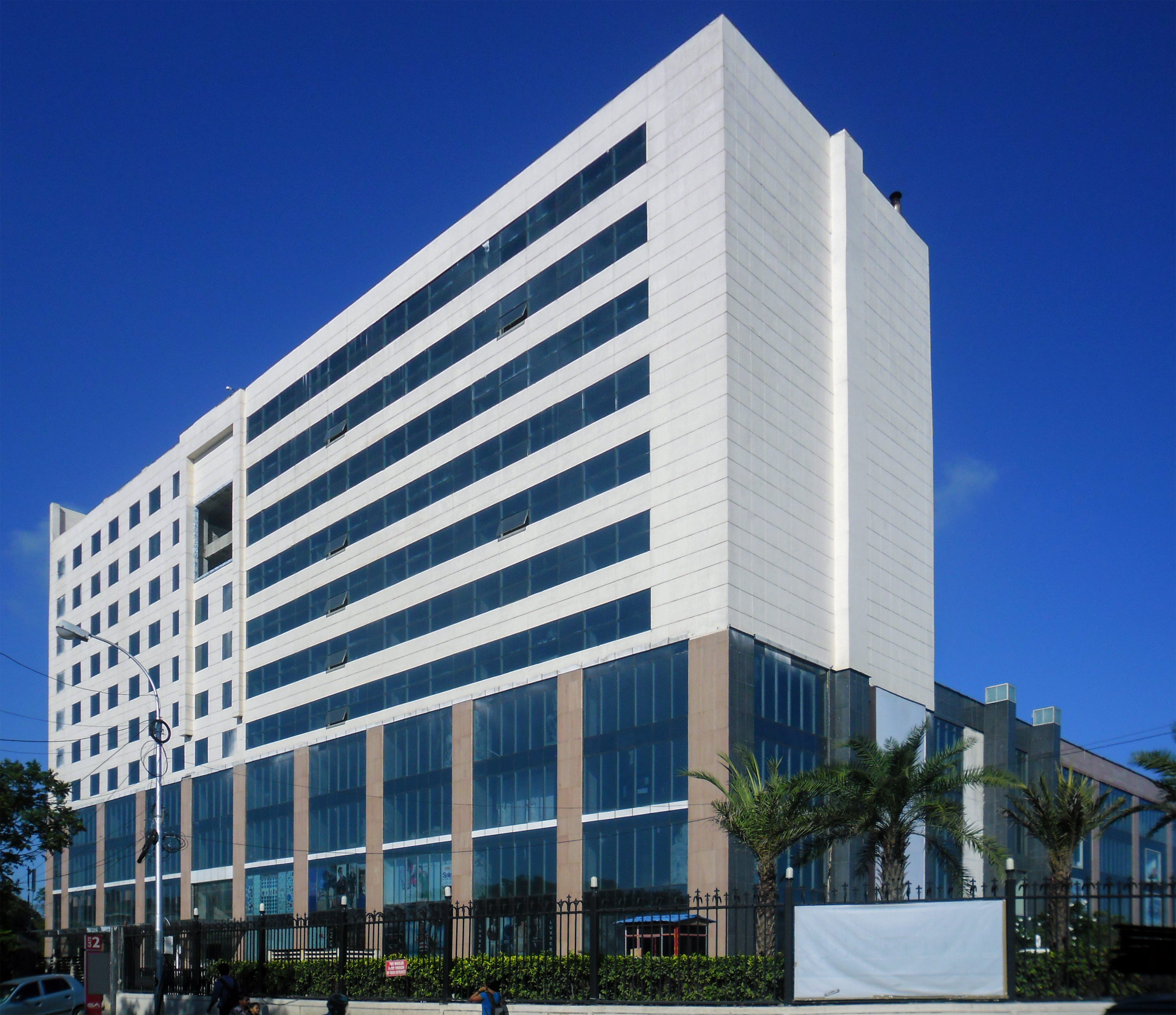 எக்ஸ்பிரஸ் அவென்யூ